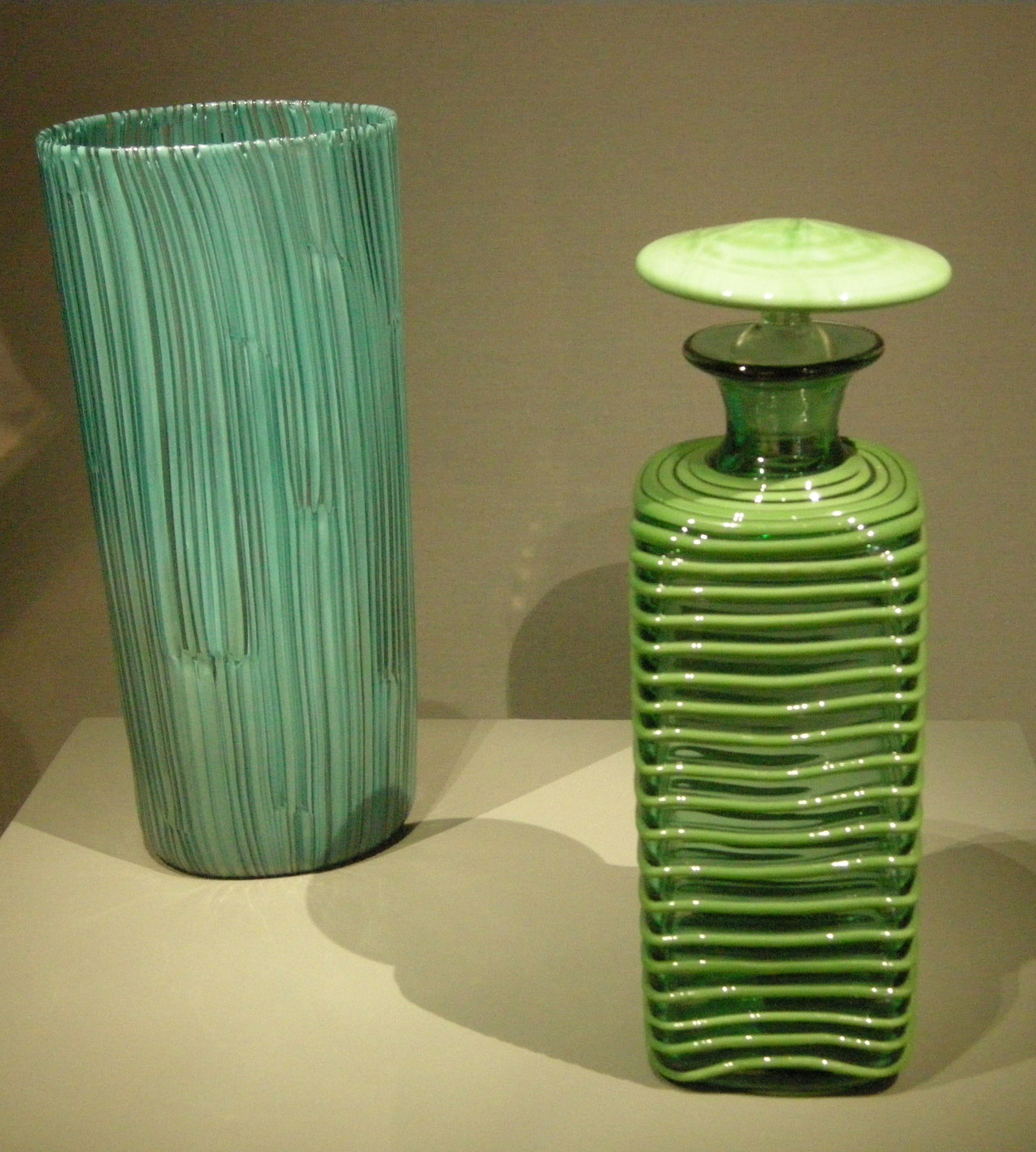 Venini & co., murano, paolo venini, vasi